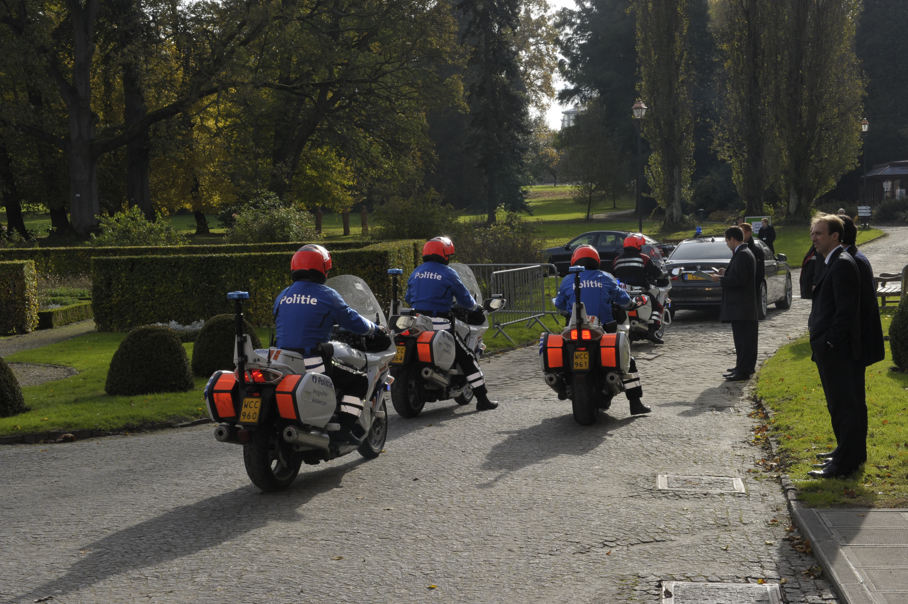 EPP Summit